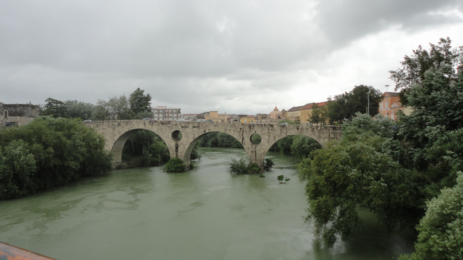 Ponte romano sul Volturno a Capua, distrutto nella Seconda Guerra Mondiale, poi ricostruito.